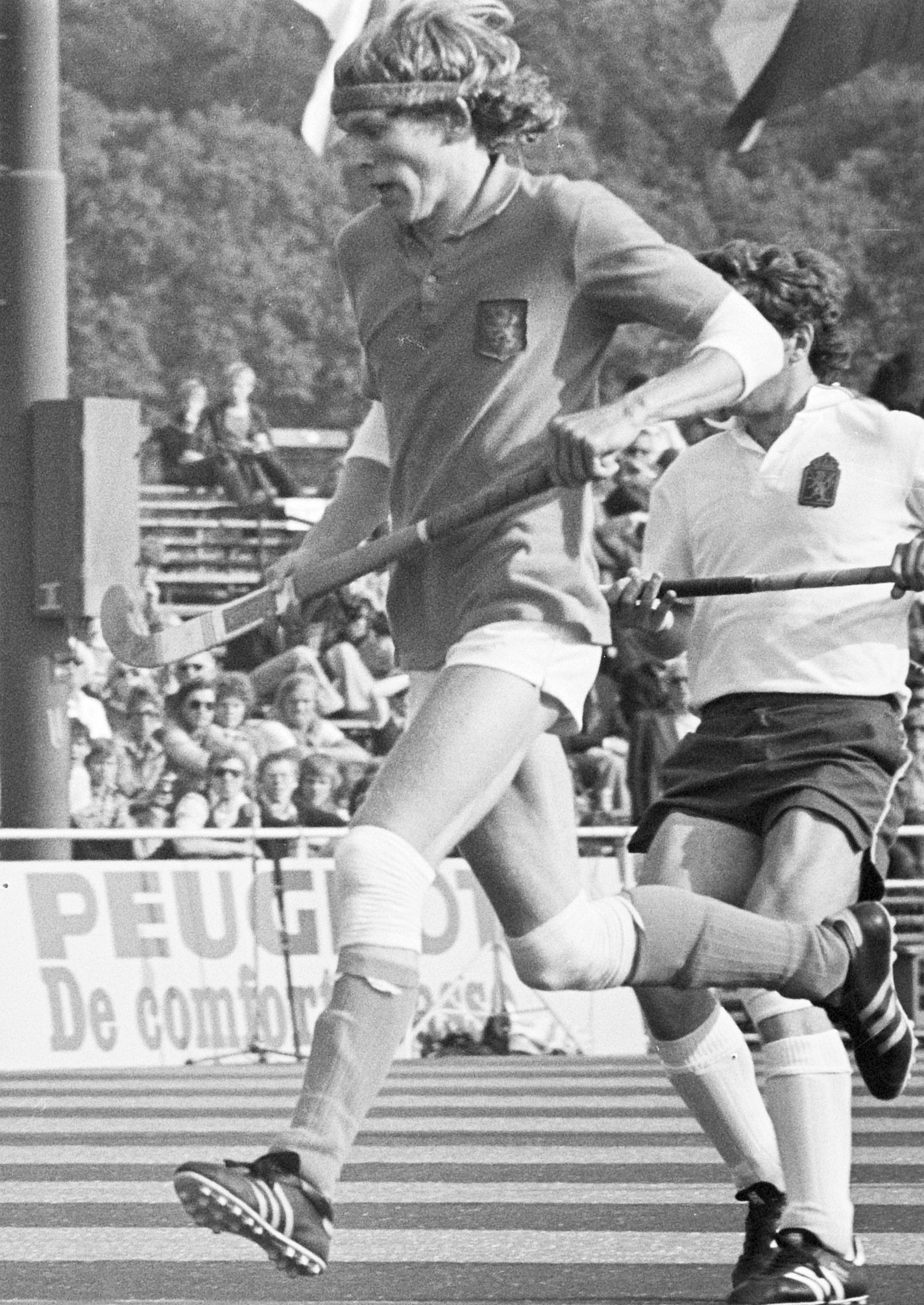 Hockey Nederland tegen Spanje 2-2 op kunstgras, Hans Jorritsma scoort tweede doelpunt.